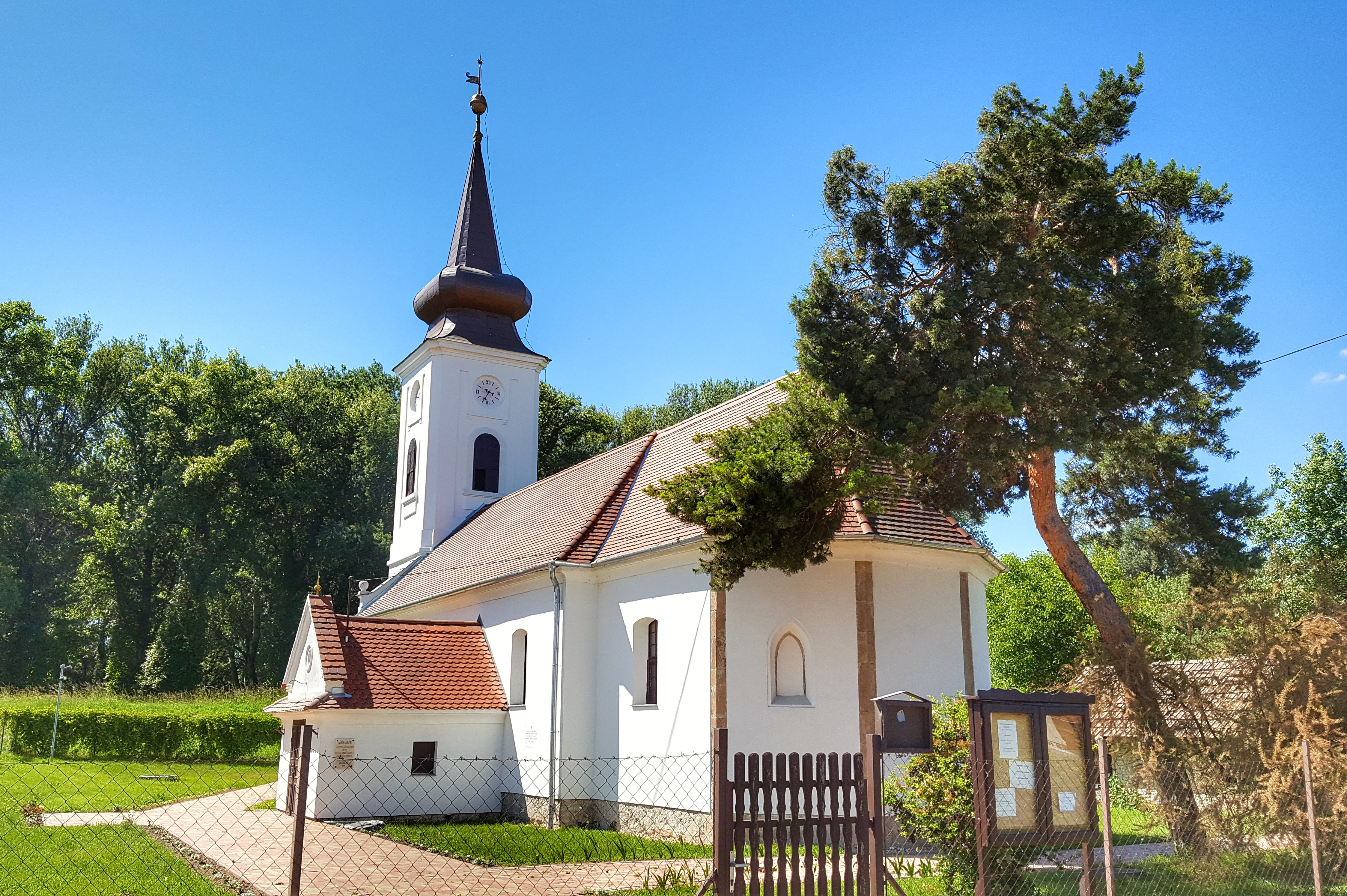 A Tiszaburai református templom 2017-ben.